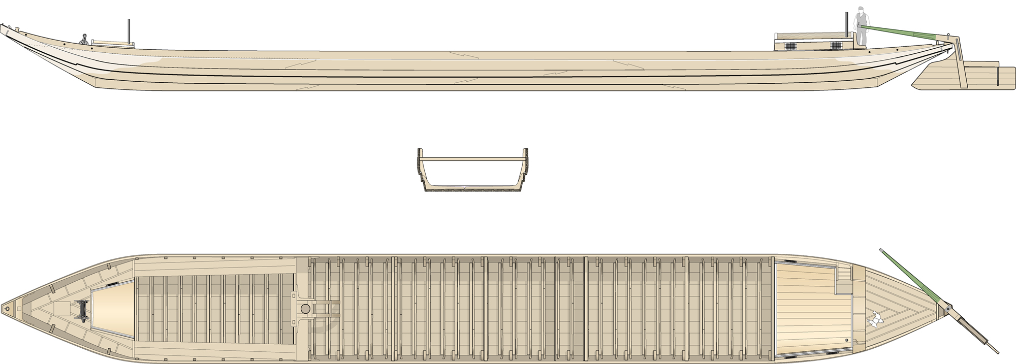 Rekonstruktion eines Butzers, Kaffenkahn ohne Schnabel im Finow-Maß, um 1880.